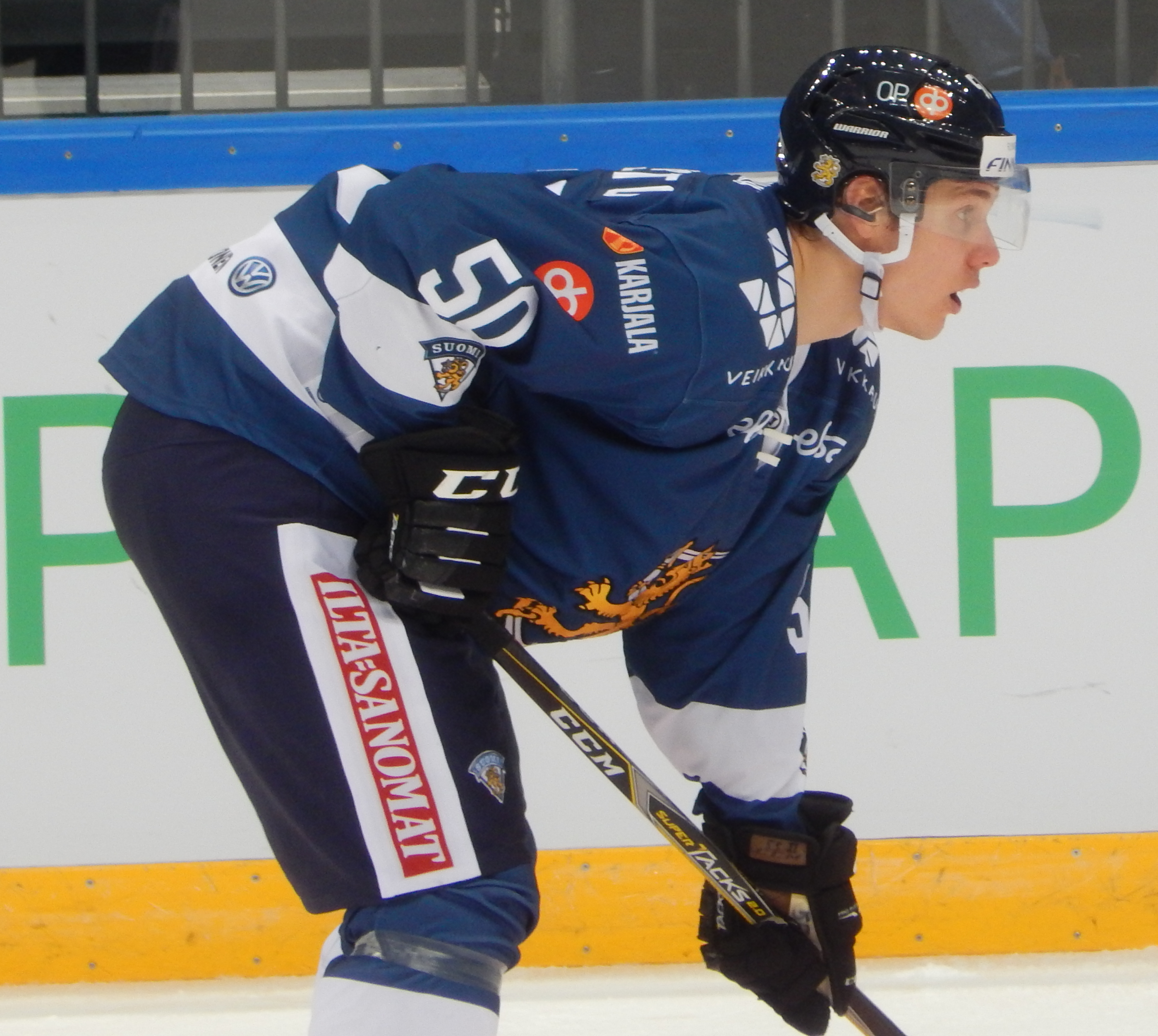 Кубок Первого Канала 2017, матч Финляндия - Южная Корея (15 декабря 2017) 50 KOIVISTO,Miika